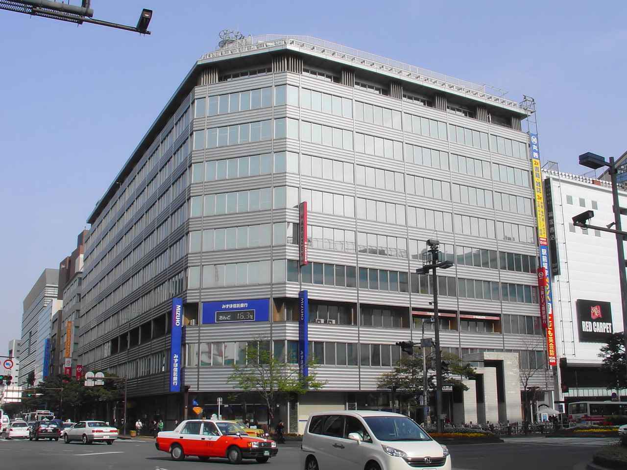 Fukuoka Building.(Chuo Ward, Fukuoka City, Fukuoka Prefecture, Japan)